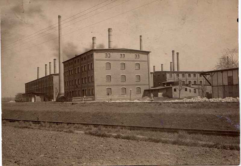 Altes Porzellanwerk Triptis